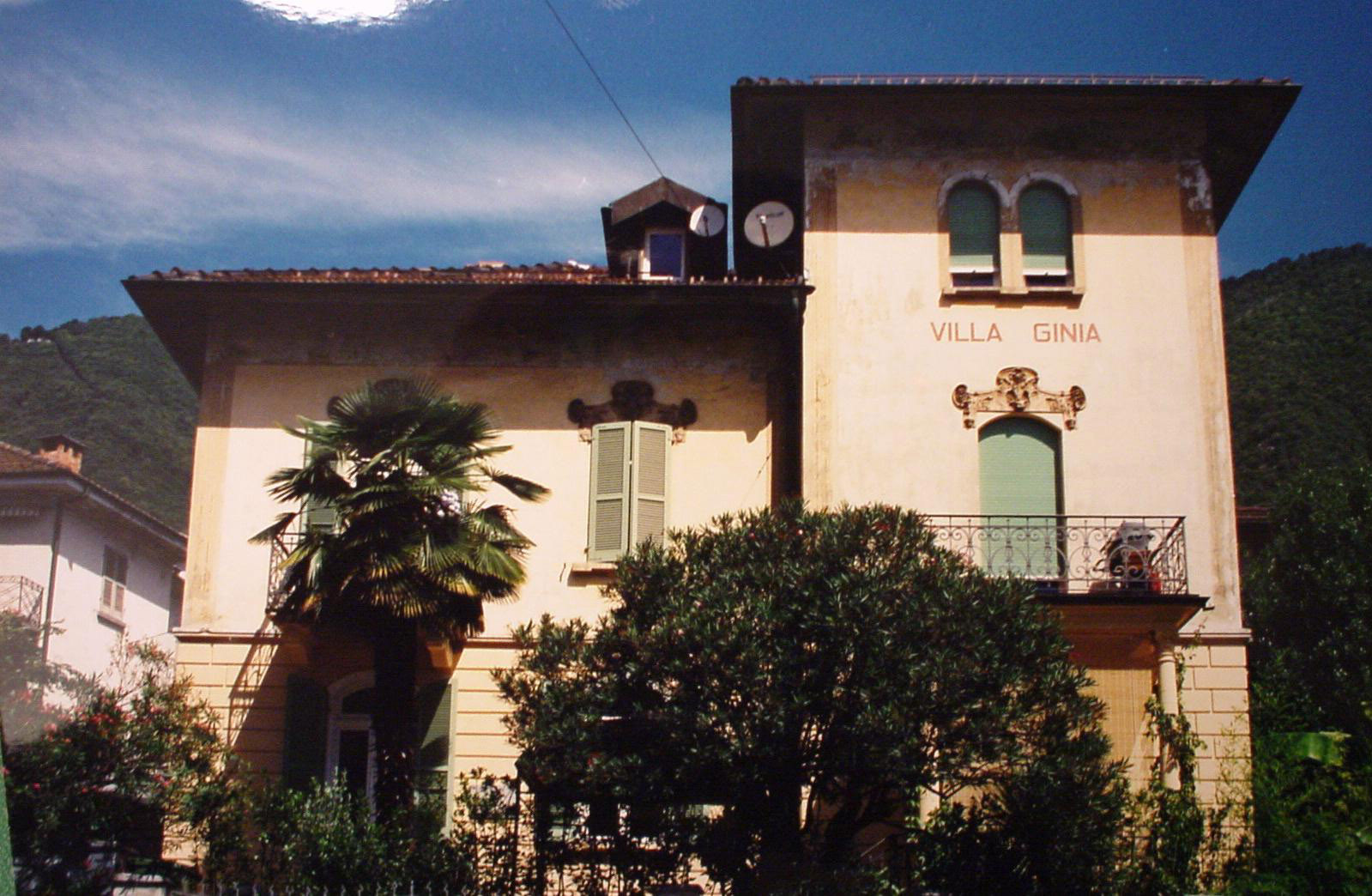 Villa Ginia in Minusio, Wohnort von Hans Huber